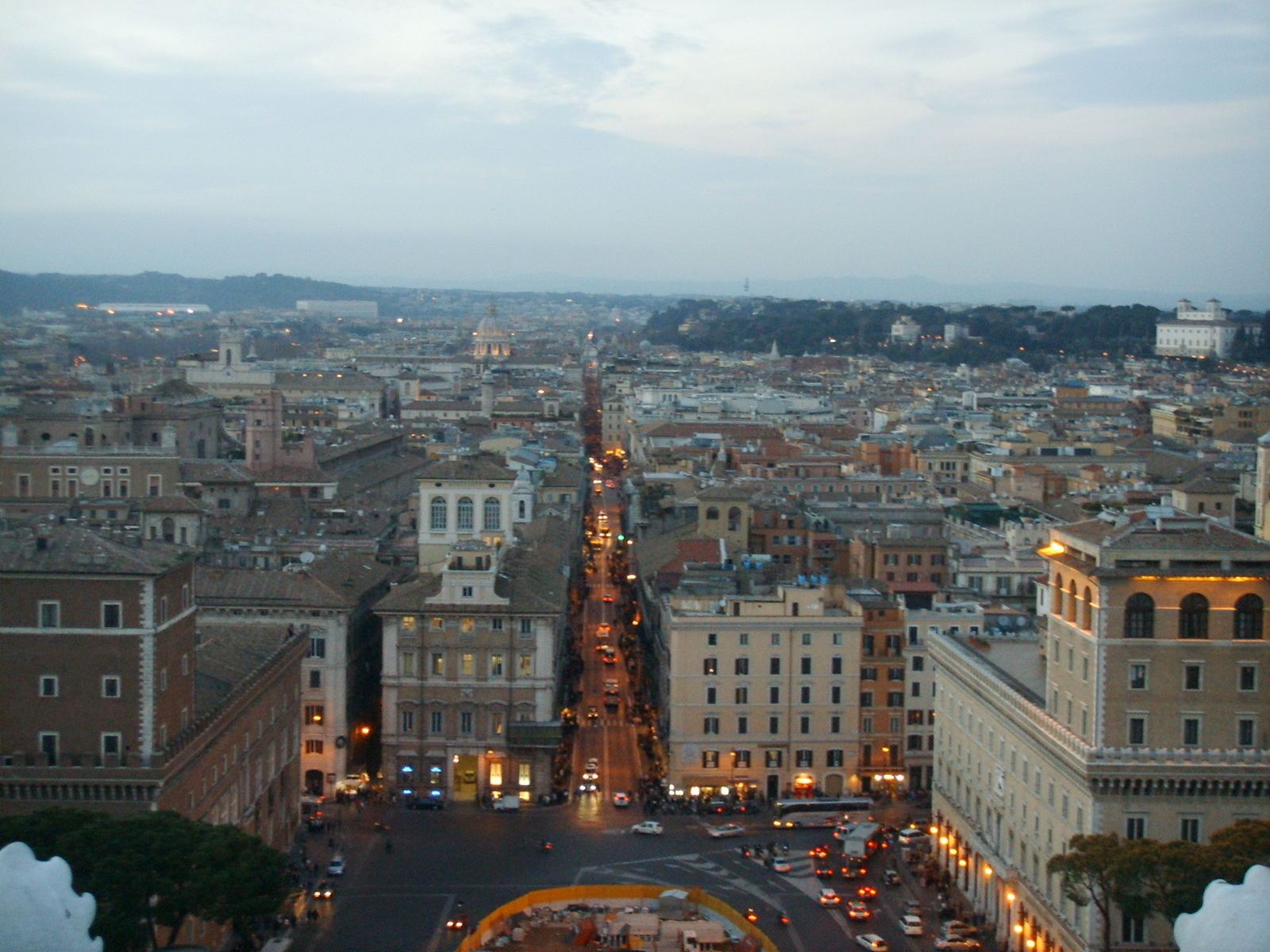 Roma, vista 04 via del corso